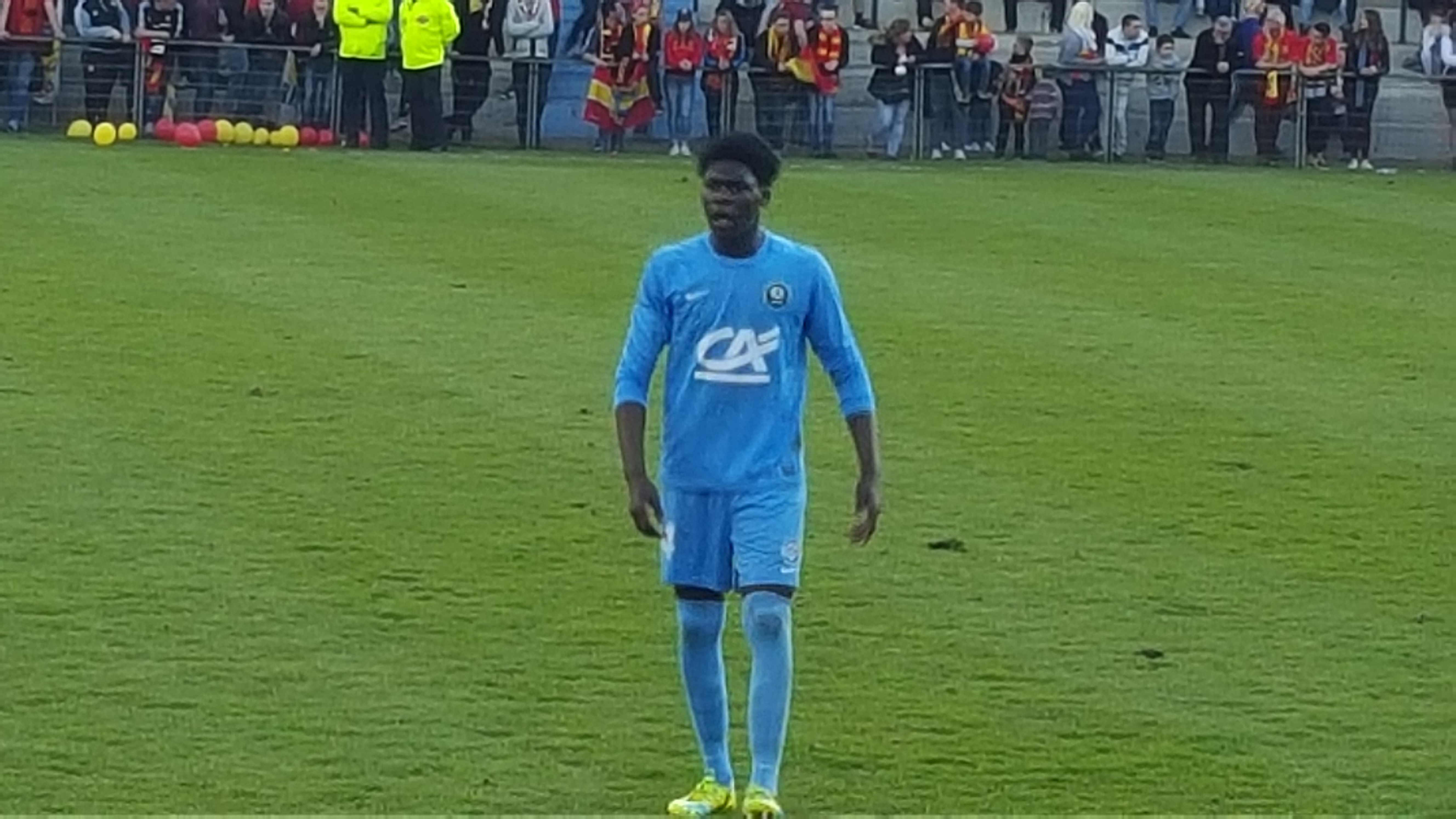 Ange Nanizayamo lors du match RC Lens / Tours FC, quart de finale de la Coupe Gambardella 2015-2016, au Stade François-Blin, le 3 avril 2016